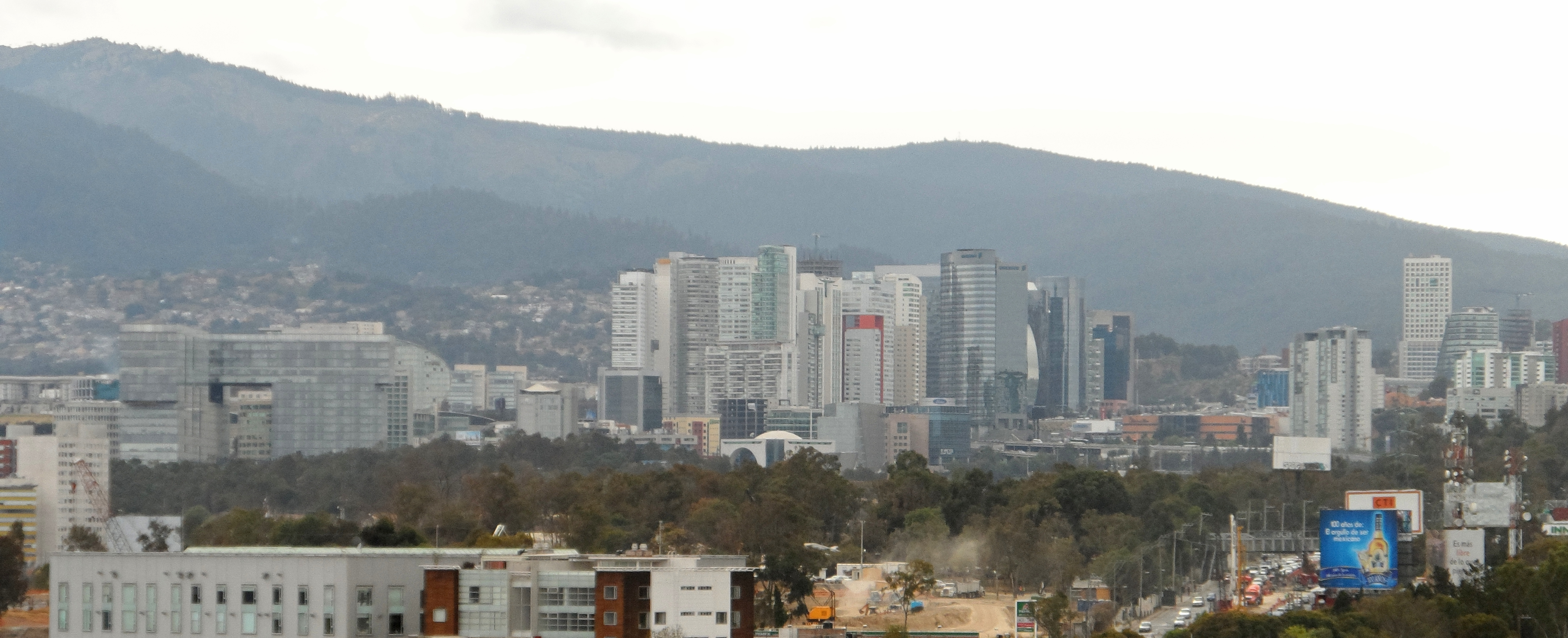 Vista del desarrollo inmobiliario conocido como City Santa Fe, en las delegaciones Cuajimalpa de Morelos y Alvaro Obregón en el Distrito Federal de México.